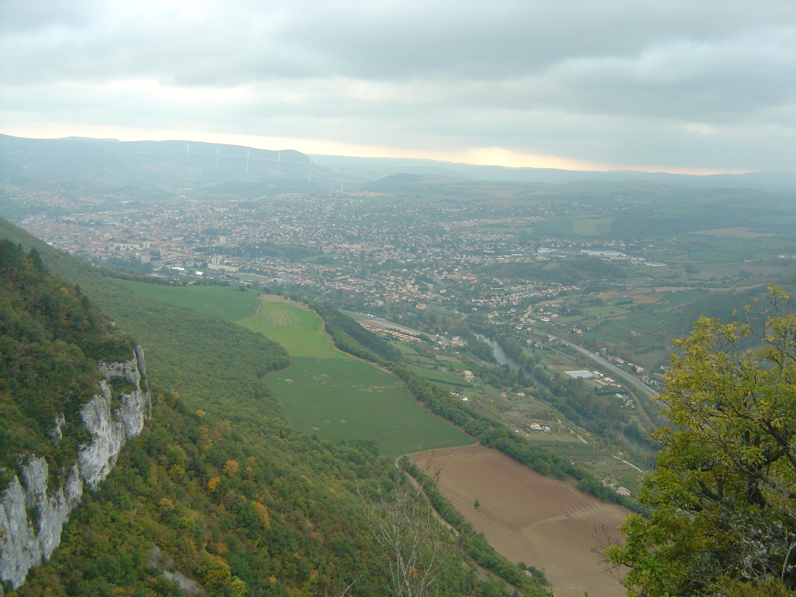 Vue de la ville de Millau et du viaduc depuis le plateau lors du festival des Templiers 2013